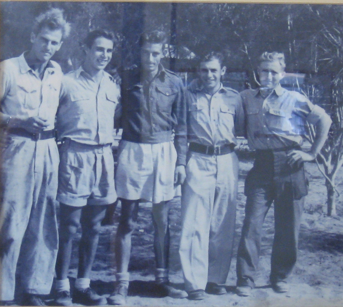 Nahariyya - Liberman House Museum - Historical images of Nahariyya נהריה בית ליברמן - מוזיאון להיסטוריה של נהריה - תצלומים היסטוריים של נהריה כיתת הימאים ששמרה על חוף נהריה באביב 1948 משמאל: אנדראיס מאייר, יוסי פריסם, אוטו אטלינגר, פרנטה כהן, מרטין וידנבאום